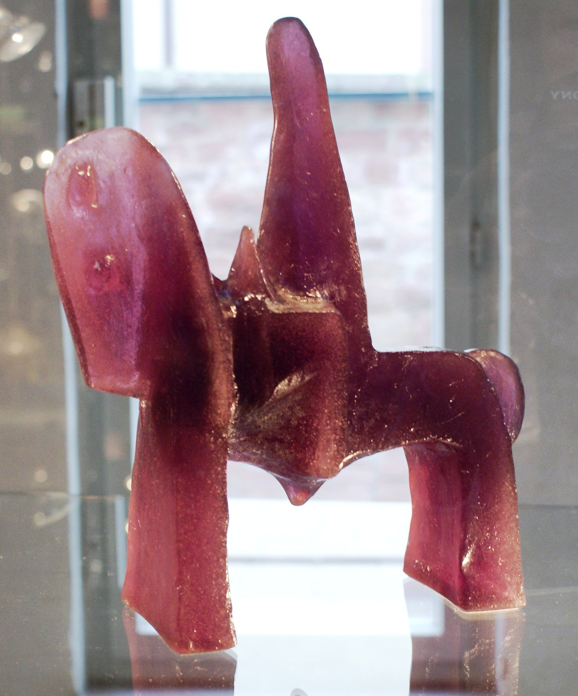 Glasmuseum Wertheim, Deutschland, Main-Tauber-Kreis, Gründung 1976. Studioglasobjekt: „Parsifal“ von Claude Wetzstein für Daum Frères, Nancy/Frankreich, 1975